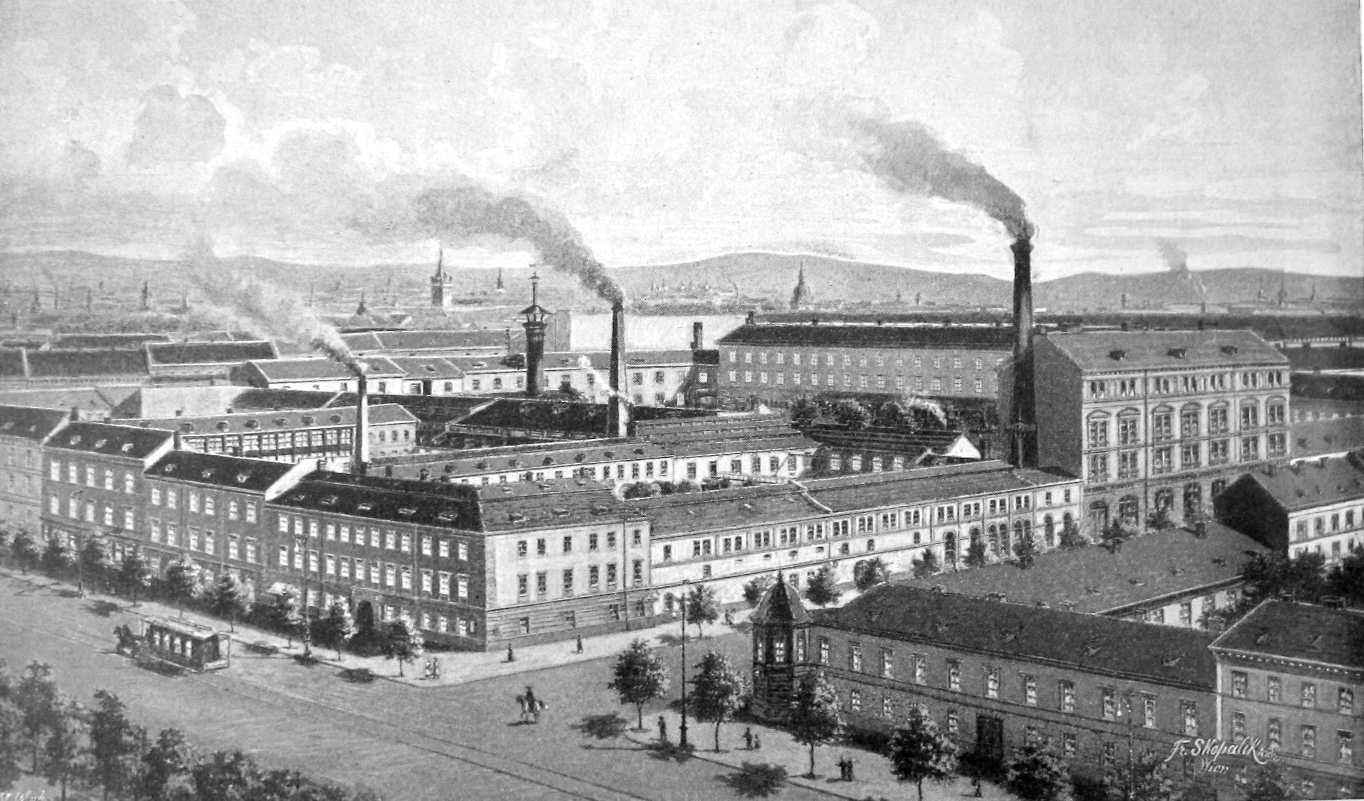 Pivovar U Primasů na Václavském náměstí v Praze